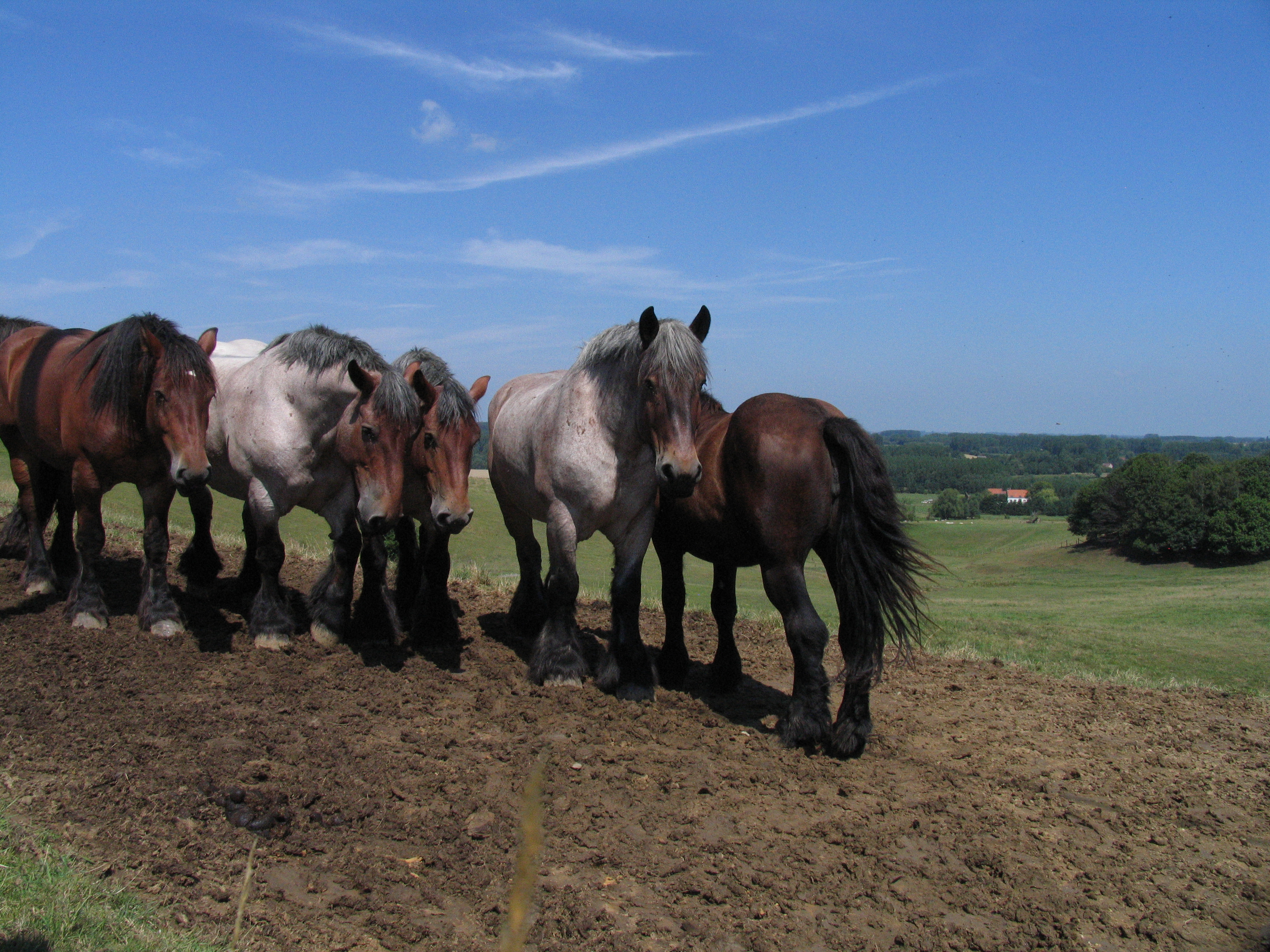 Galmaarden - Congobergstraat - Brabantse Trekpaarden This photo of immovable heritage has been taken in the Flemish Region